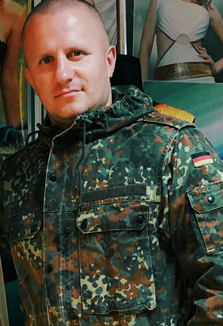 Владислав Попович. ОУН